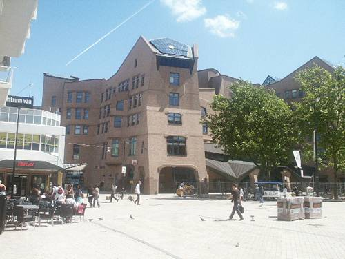 ING-office, Bijlmerplein, Amsterdam Zuidoost